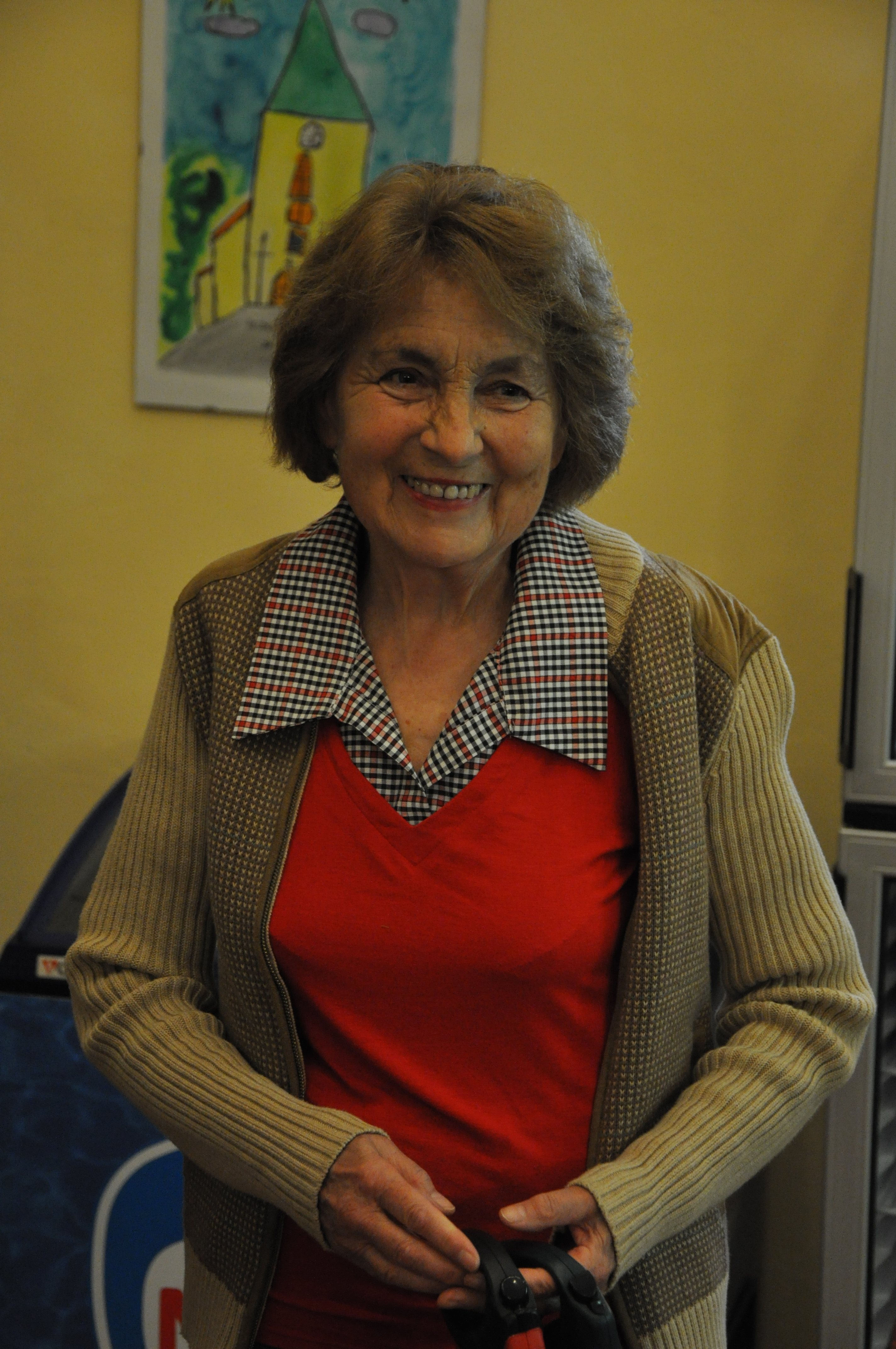 Eleonora Dujková (* 1929), hraběnka z rodu Bubnů z Litic, majitelka zámku Doudleby nad Orlicí